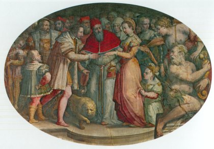 Die Trauung von Caterina de’ Medici und Heinrich von Orléans, dem zweiten Sohn Franz’ I. und zukünftigen König Heinrich II., vollzogen am 28. Oktober 1533 durch Caterinas Großonkel, Papst Clemens VII.